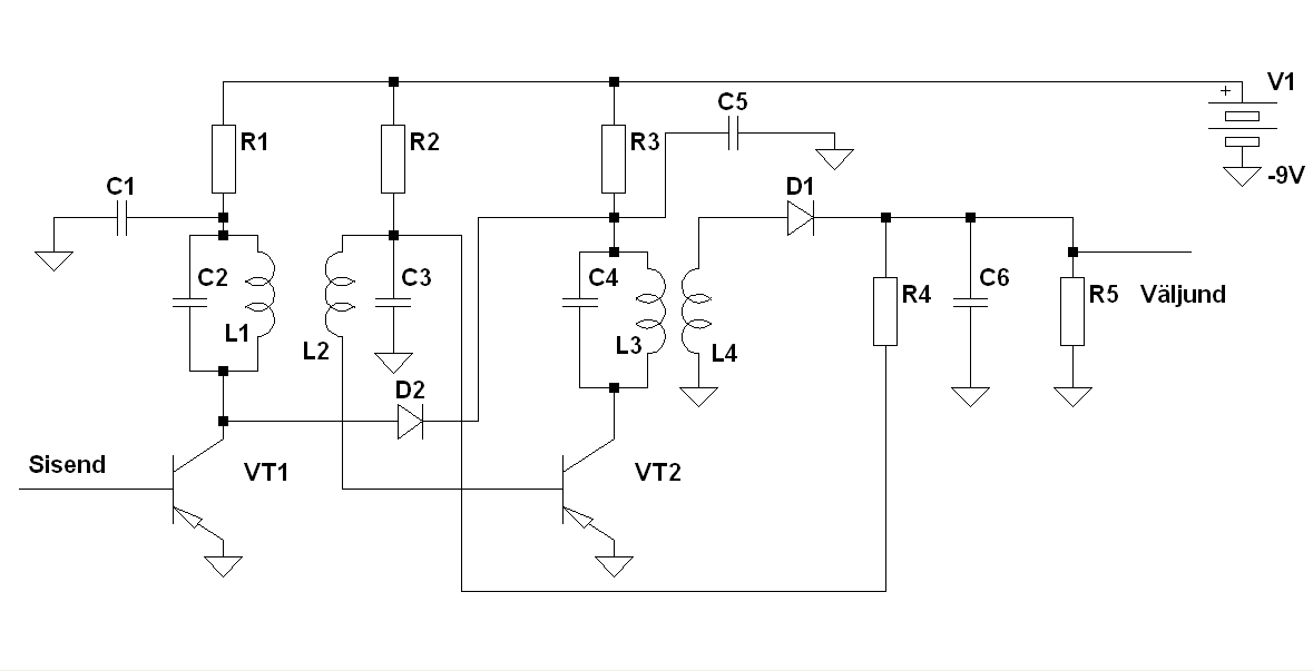 AVR alalisvoolurežiimi muutmisega võimenduse kontroll, kus kollektorvool suureneb